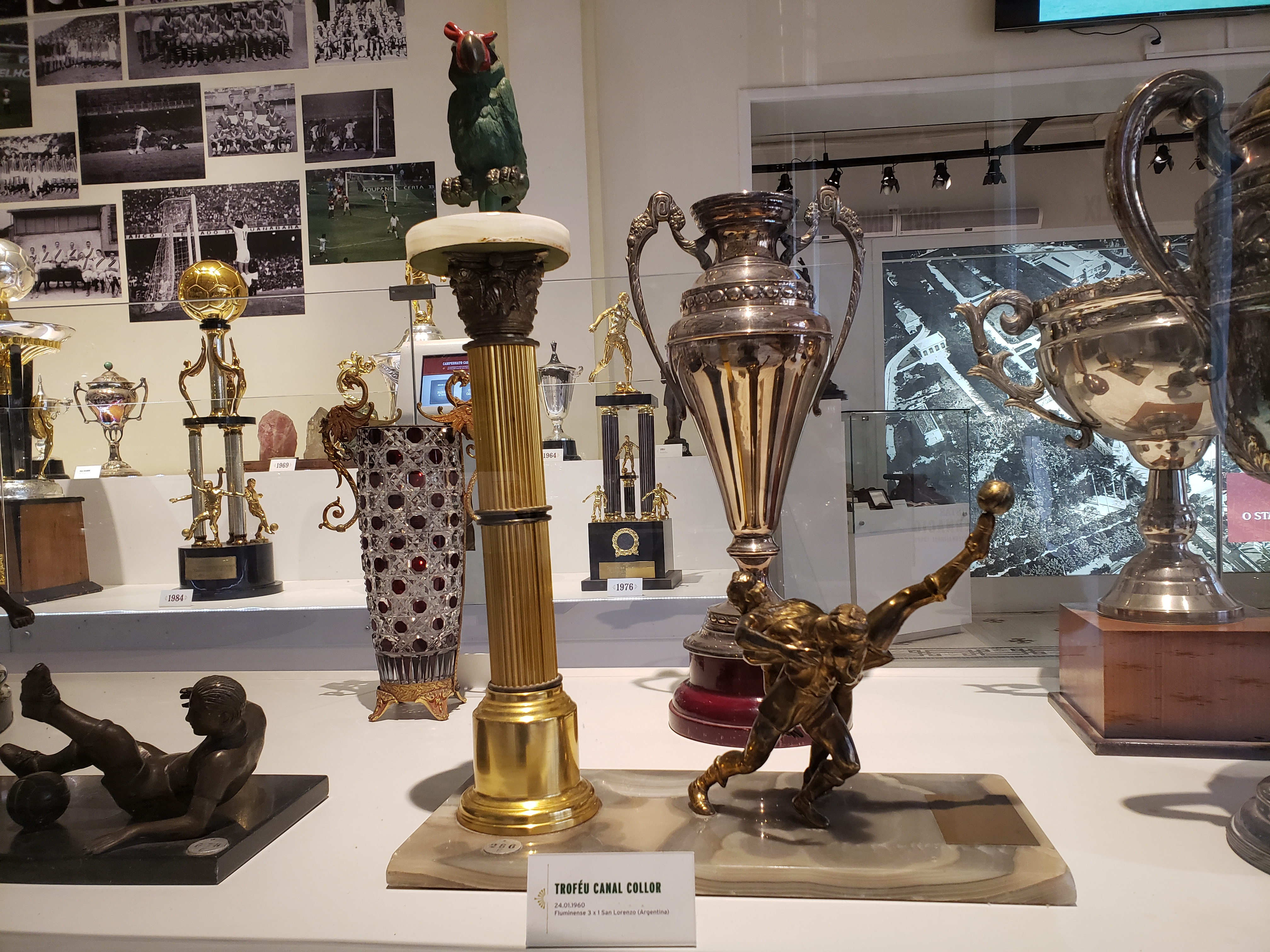 Taça Canal Collor 1960 conquistada pelo Fluminense Football Club contra o San Lorenzo de Almagro (ARG), no México, em 24/01, no Estádio Olímpico Universitário.